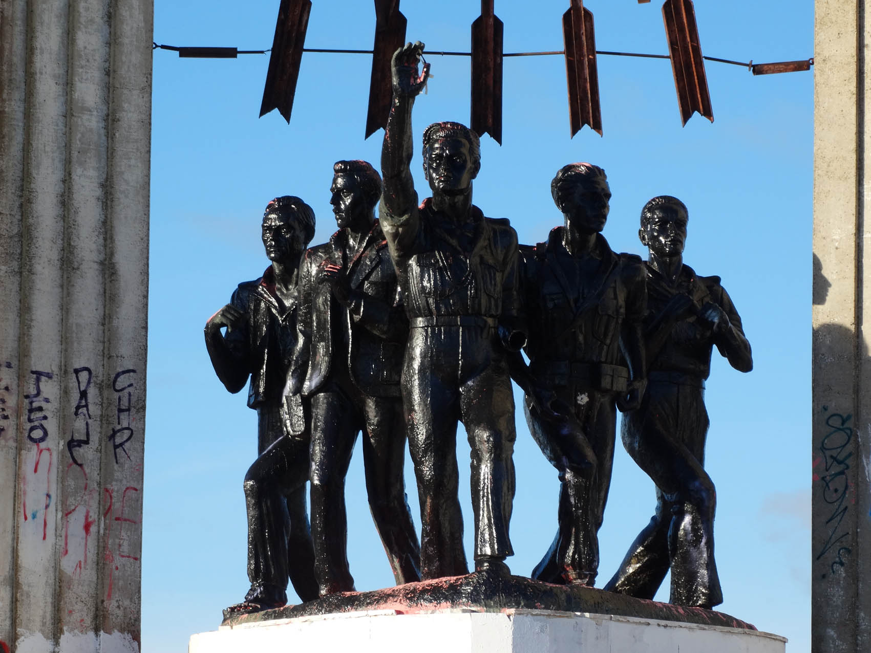 Monumento a Onésimo Redondo inaugurado el 25 de julio de 1961 en el Cerro de San Cristóbal de Valladolid. En el 2014 el monumento está muy deteriorado y abandonada su conservación.